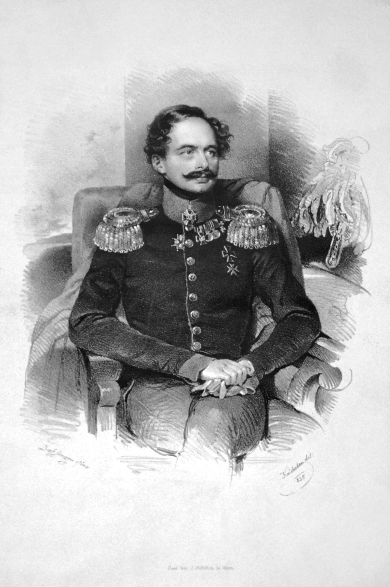 Portrait of Adolph von Nassau-Weilburg